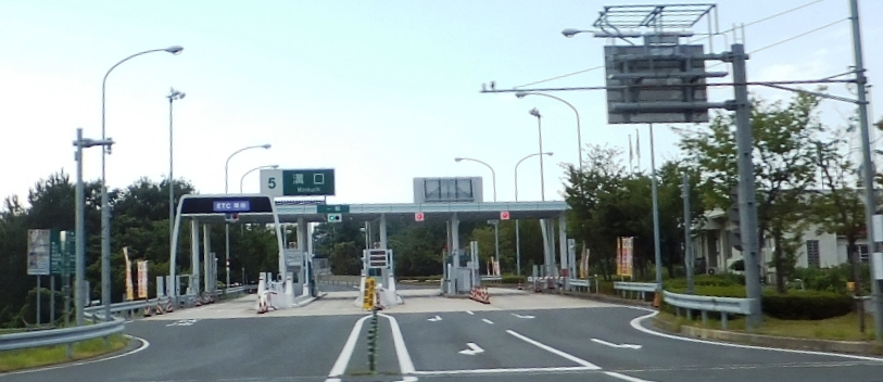 溝口インターチェンジ （2013年）